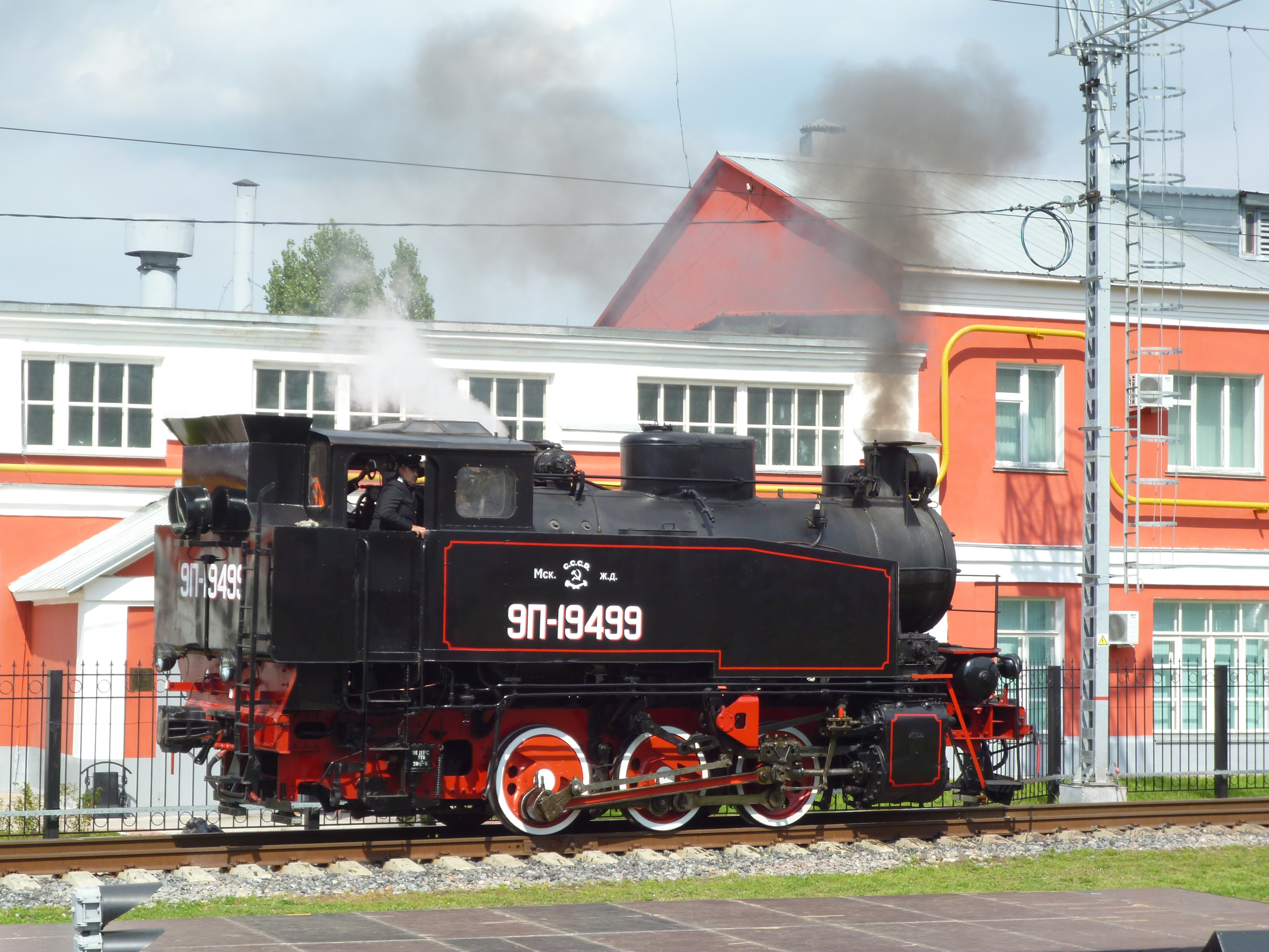 Паровоз 9П-19499 на параде в депо Подмосковная